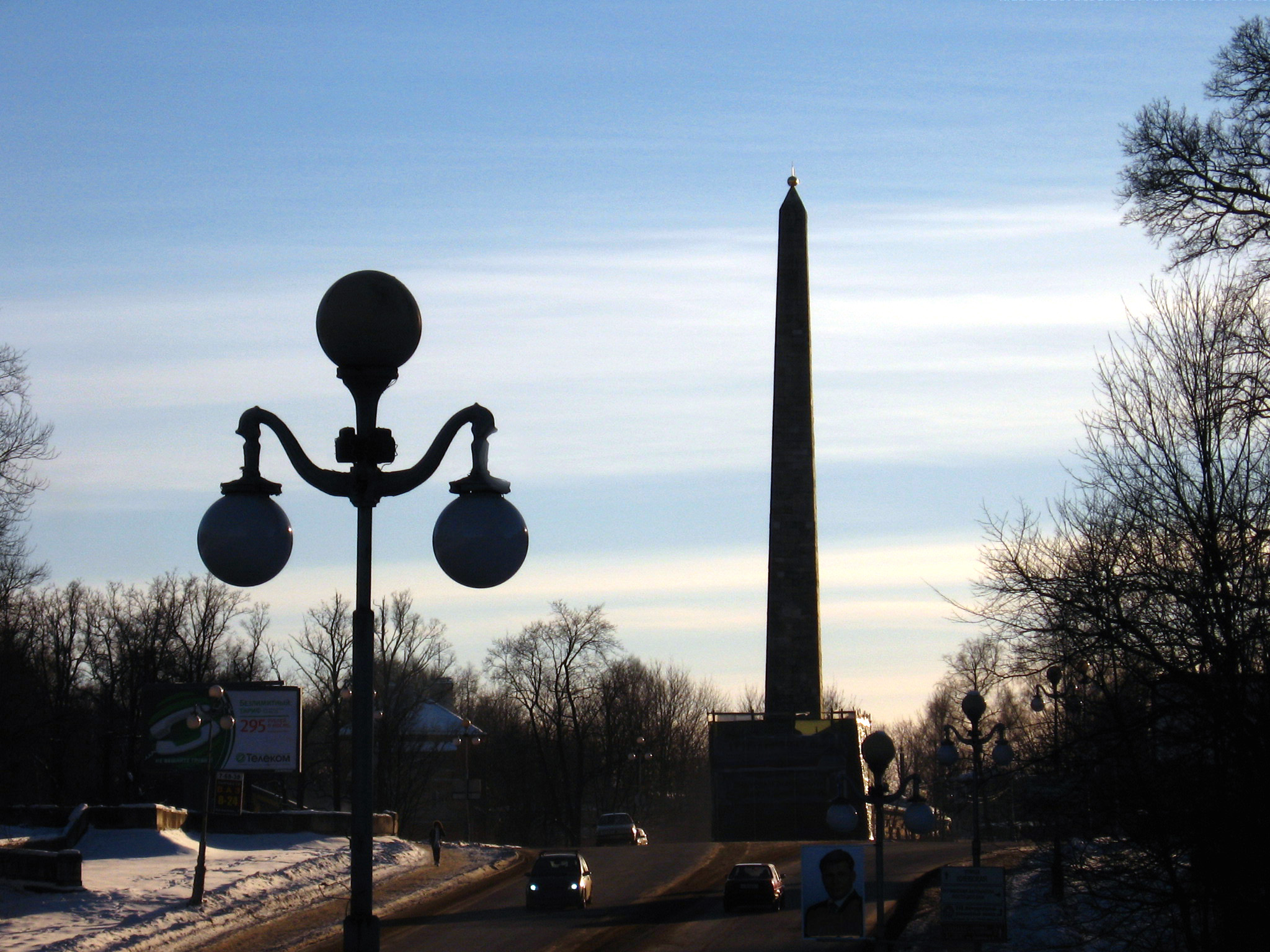 Коннетабль в Гатчине. Вид со стороны терассы на проспекте 25-го Октября